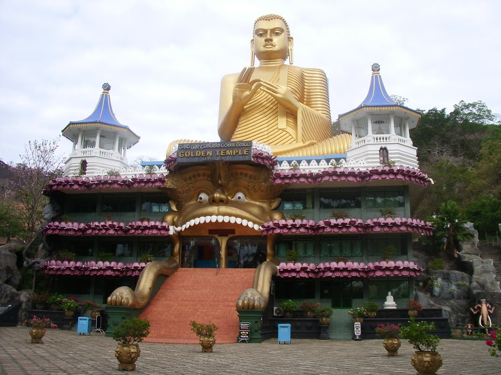 Temple daurat de Dambulla, foto feta per J. Ollé el juliol del 2006